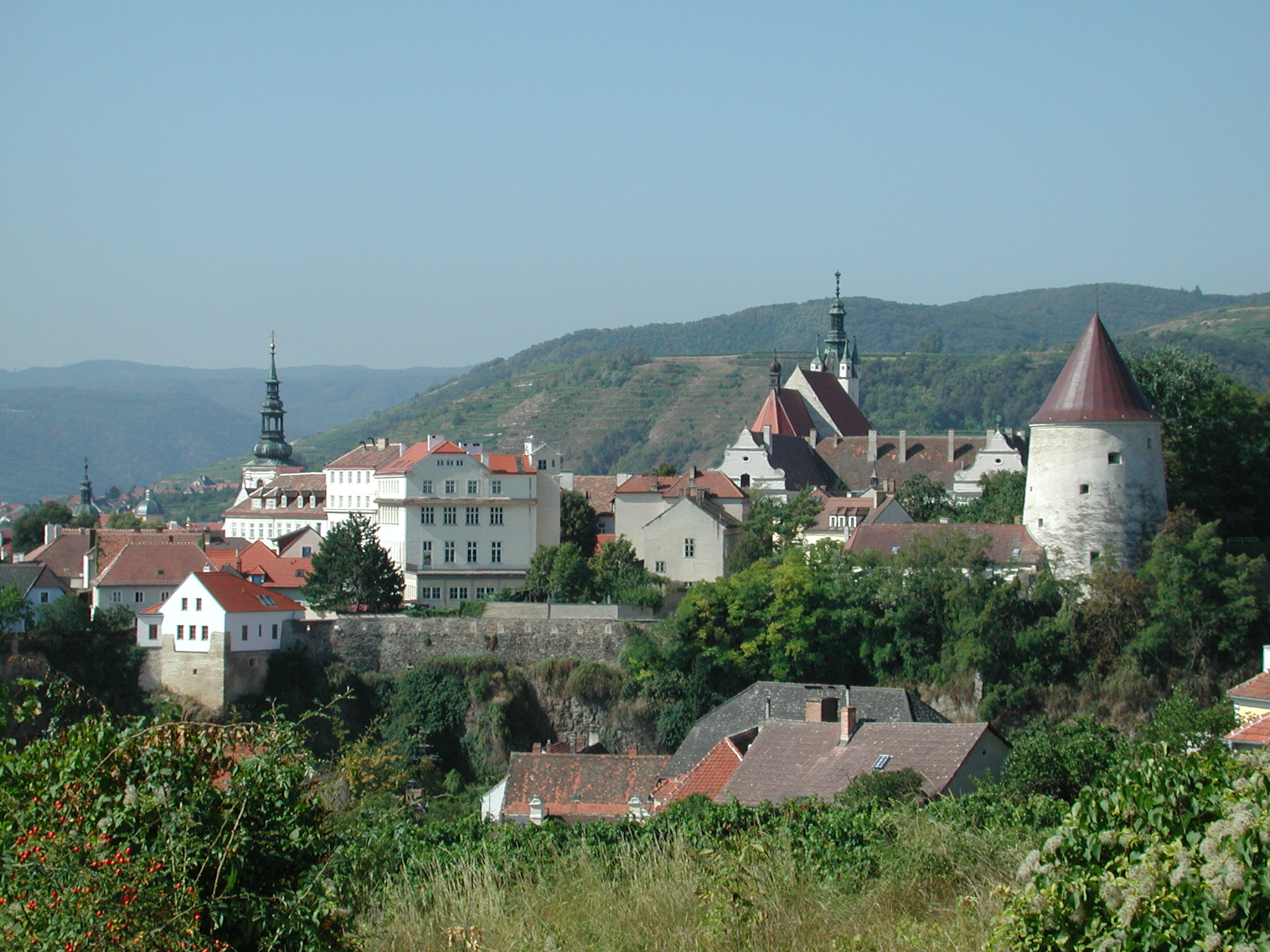 Blick von Osten auf die Altstadt von Krems an der Donau, Österreich